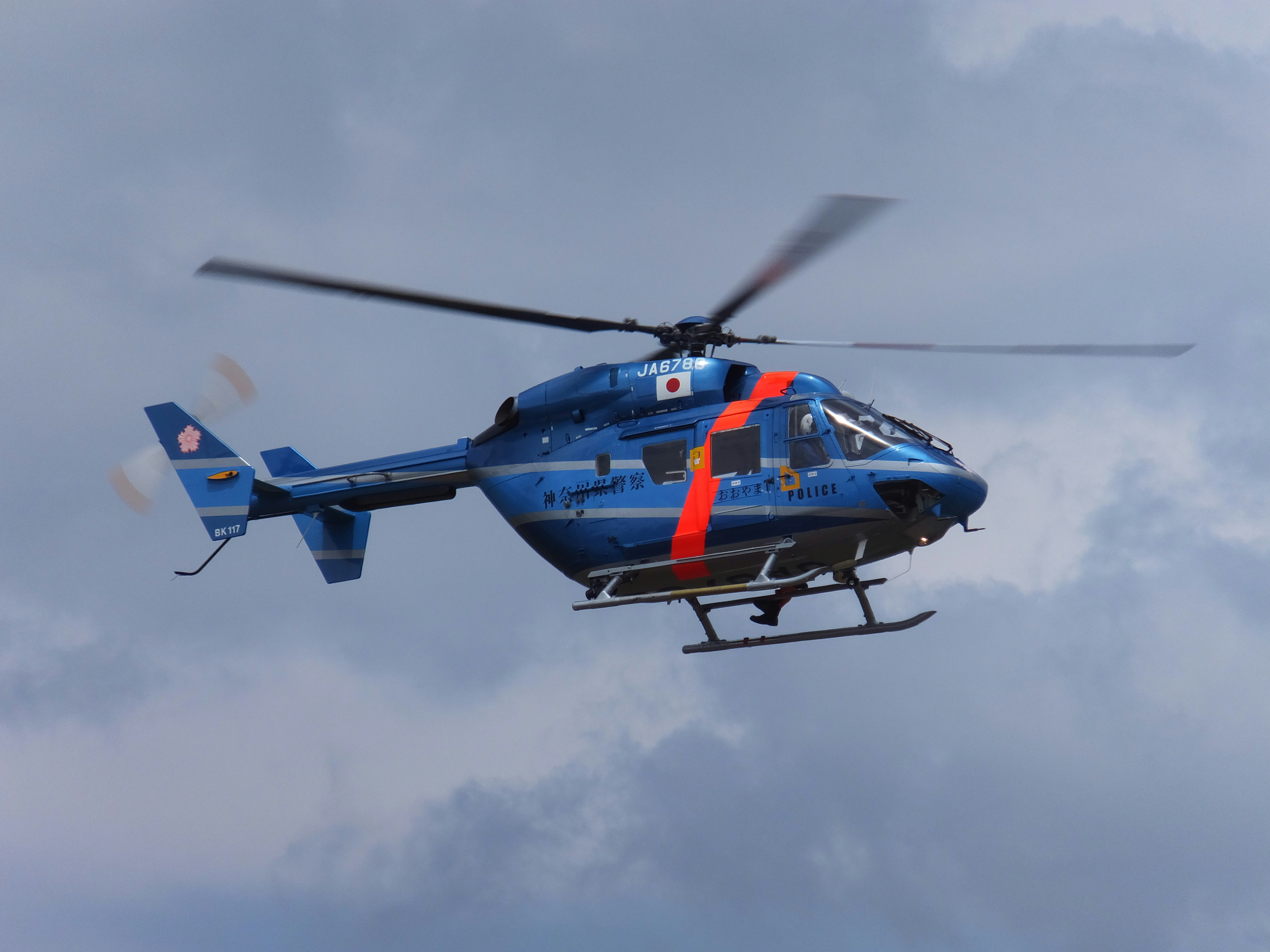 神奈川県警察・航空隊のヘリコプター おおやま（JA6780）, BK117B-2